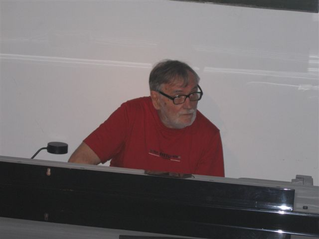 Andrzej Kurylewicz (1932-2007), Polish composer